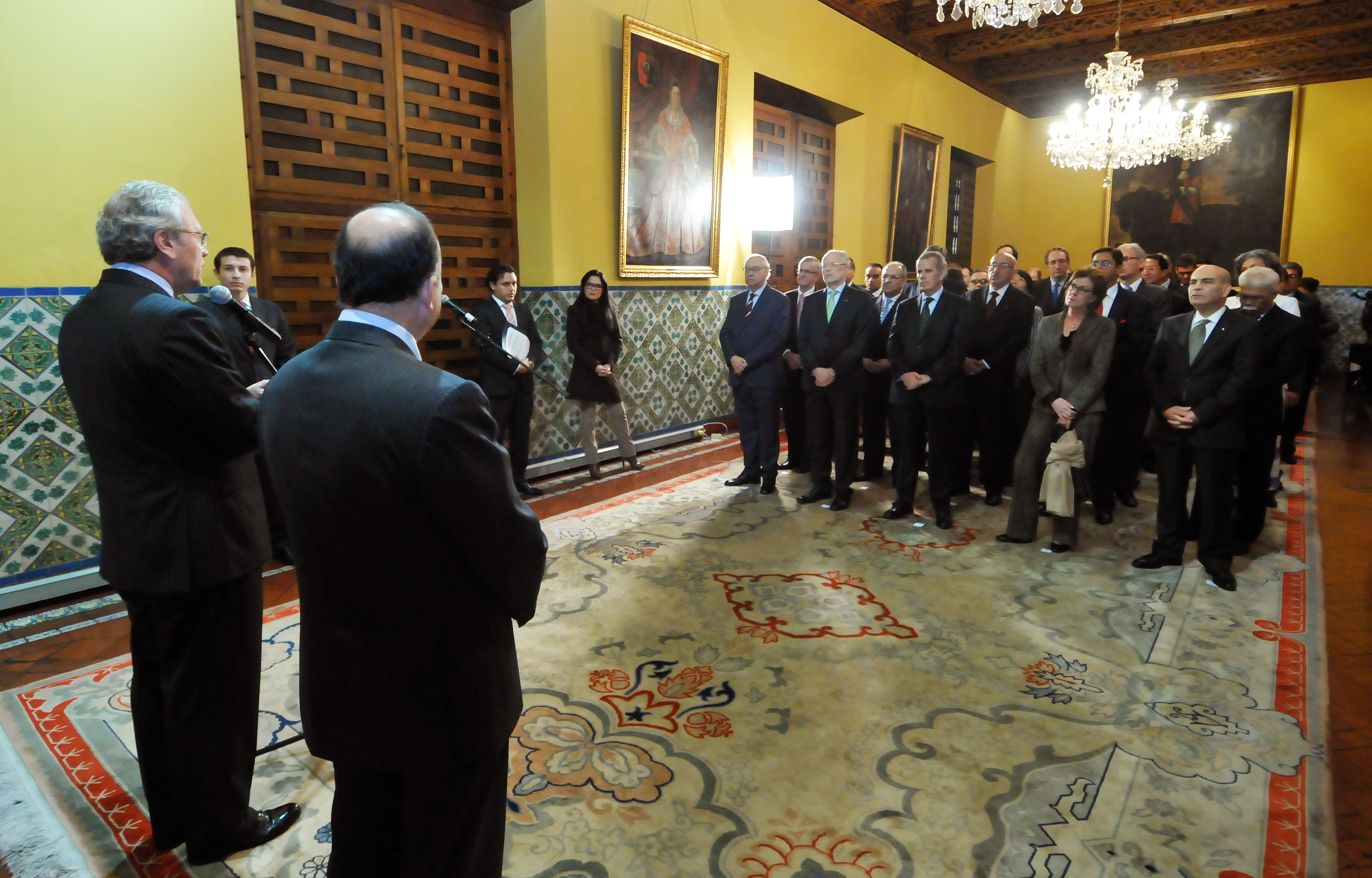 El Canciller Gonzalo Gutiérrez Reinel recibió el saludo del Cuerpo Diplomático acreditado en el Perú. Durante el acto oficial, llevado a cabo en el Palacio de Torre Tagle, el Embajador Gutiérrez expresó la vocación del Perú de ampliar el campo de su política exterior en áreas como la cooperación sur sur, y en el desarrollo de la ciencia y tecnología.